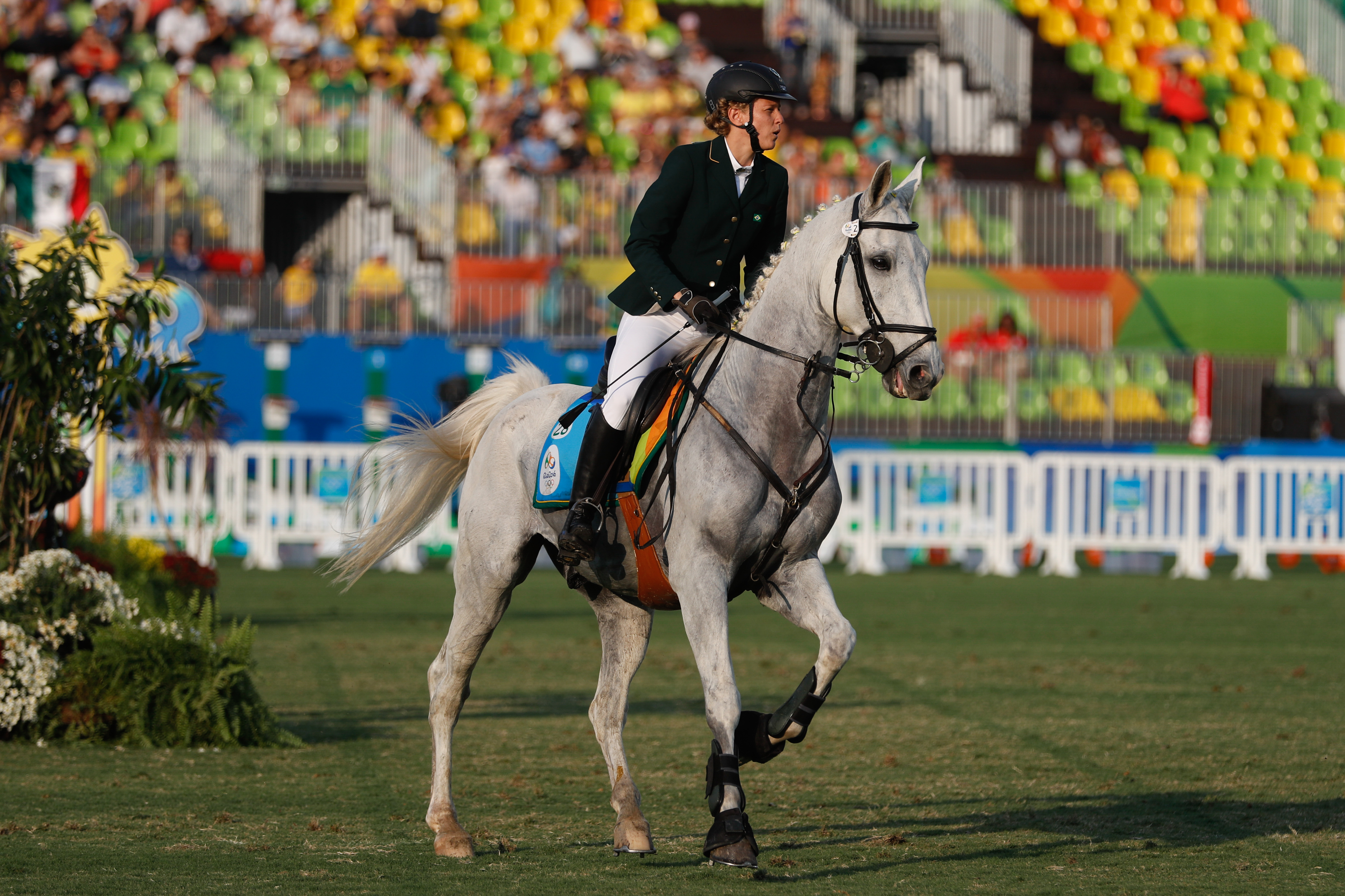 Rio de Janeiro - Brasileira Yane Maeques compete a final do pentatlo moderno dos Jogos Olímpicos Rio 2016 no Estádio de Deodoro (Fernando Frazão/Agência Brasil)